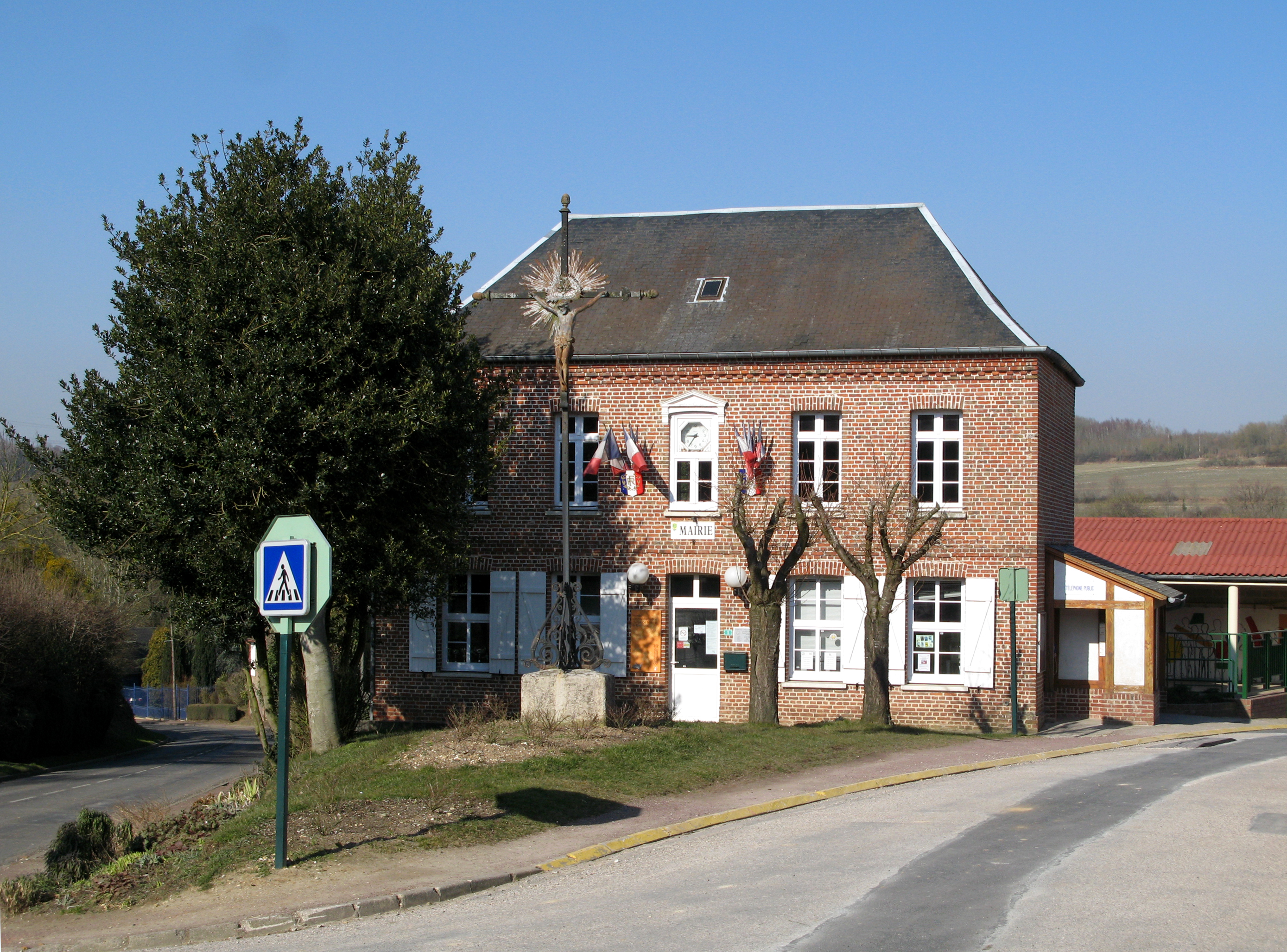 Havernas (Somme, France) - La mairie, devant laquelle se dresse un calvaire. .